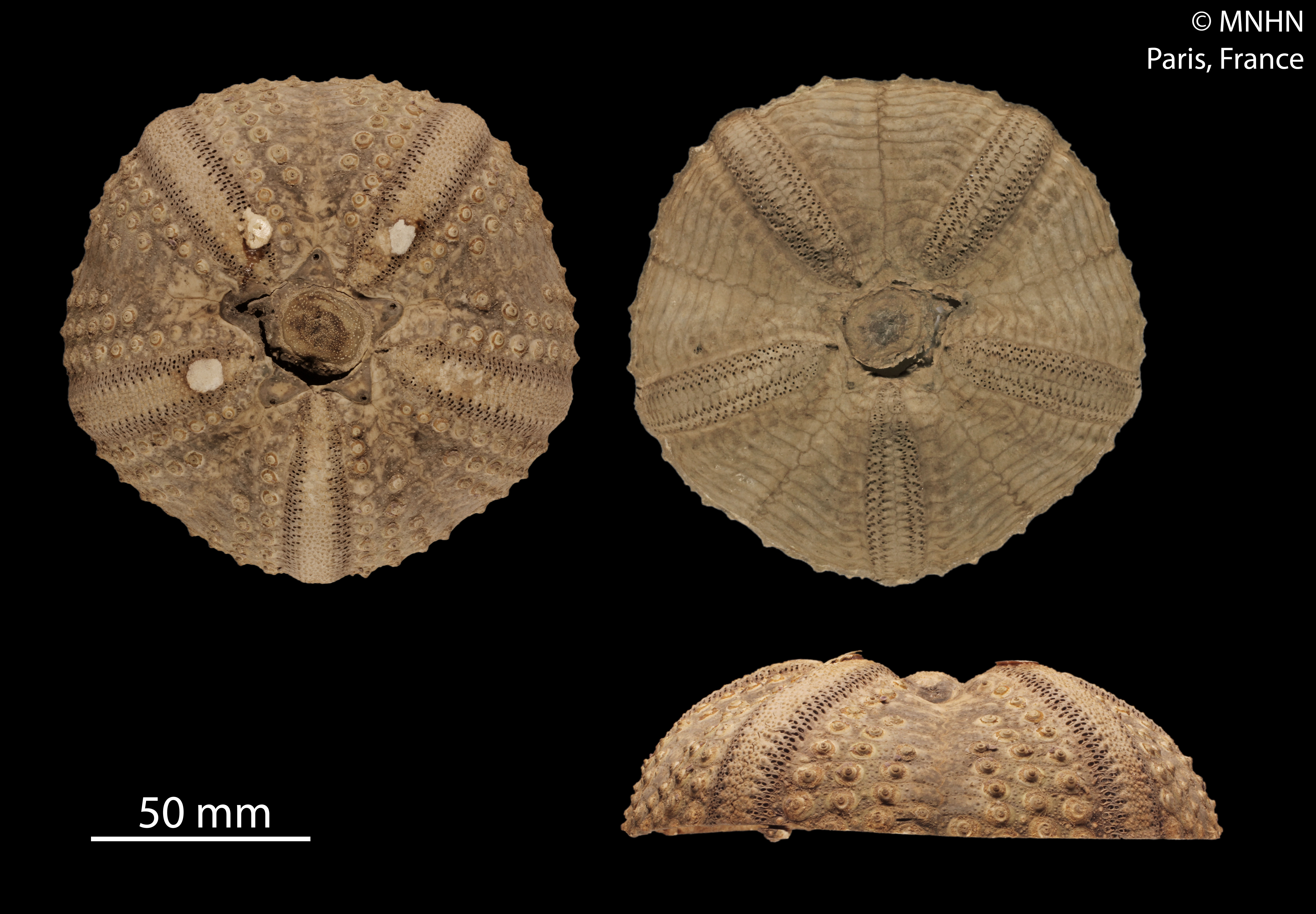 Test d'Echinothrix calamarisSpécimen MNHN-IE-2013-10473, sous la dénomination Astropyga desorii L. Agassiz, 1846Collection : Échinodermes (IE)Muséum National d'Histoire Naturelle (Paris, France) Origine : Libellé du pays : MER ROUGE